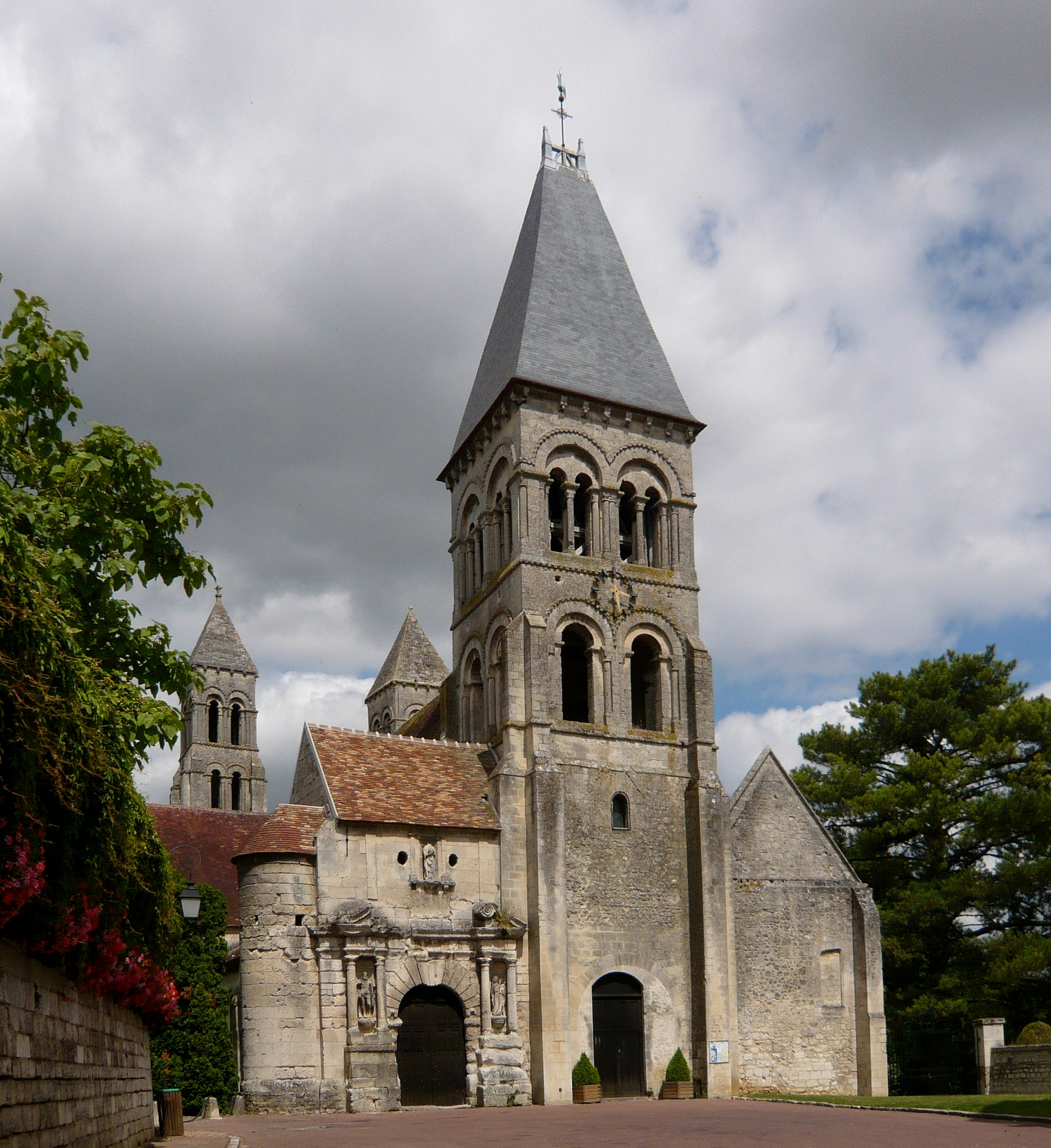 Façade de l'abbaye de Morienval (Oise)